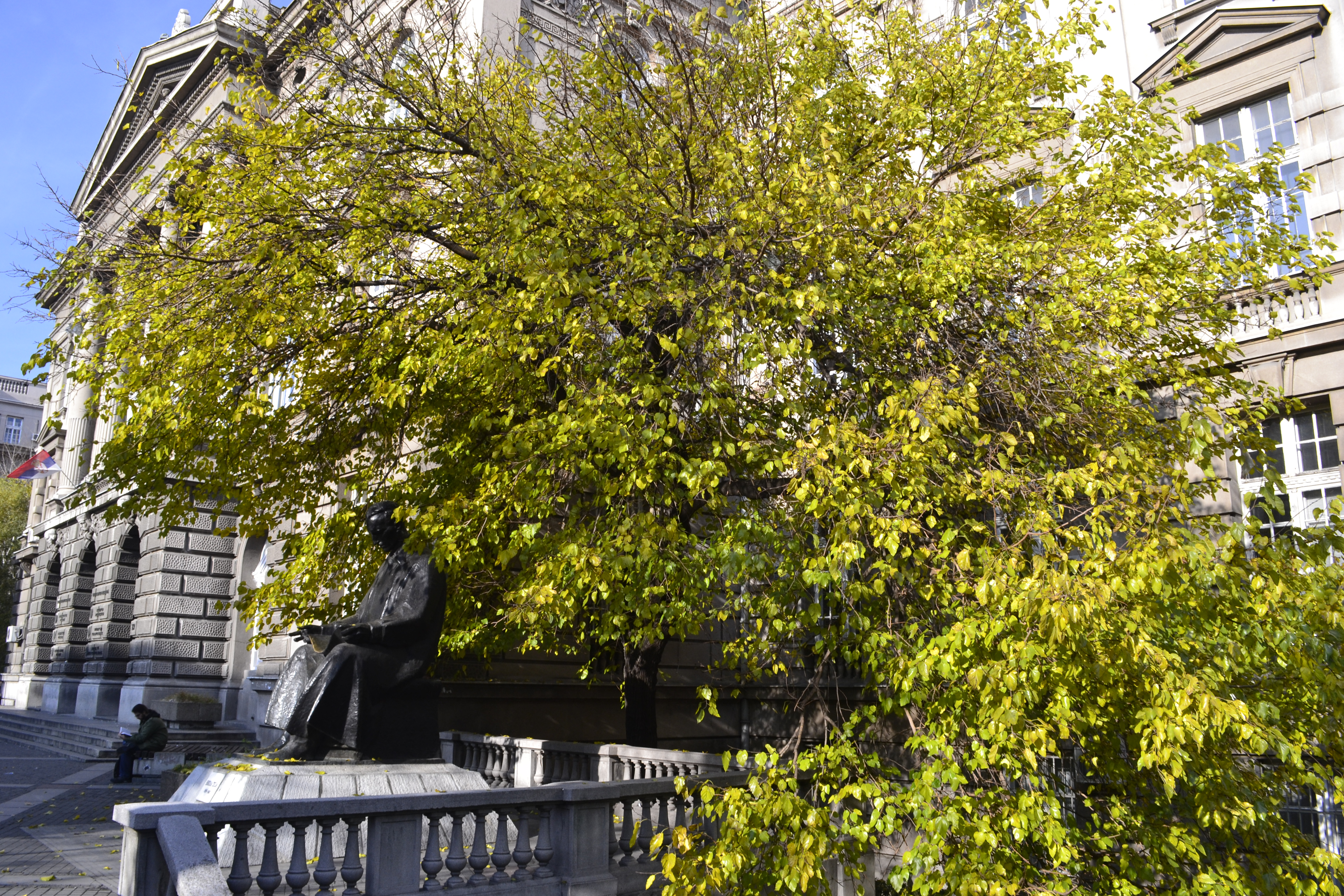 Бели дуд (Morus alba) испред Машинског факултета у Београду. Испод дрвета је споменик Николи Тесли.